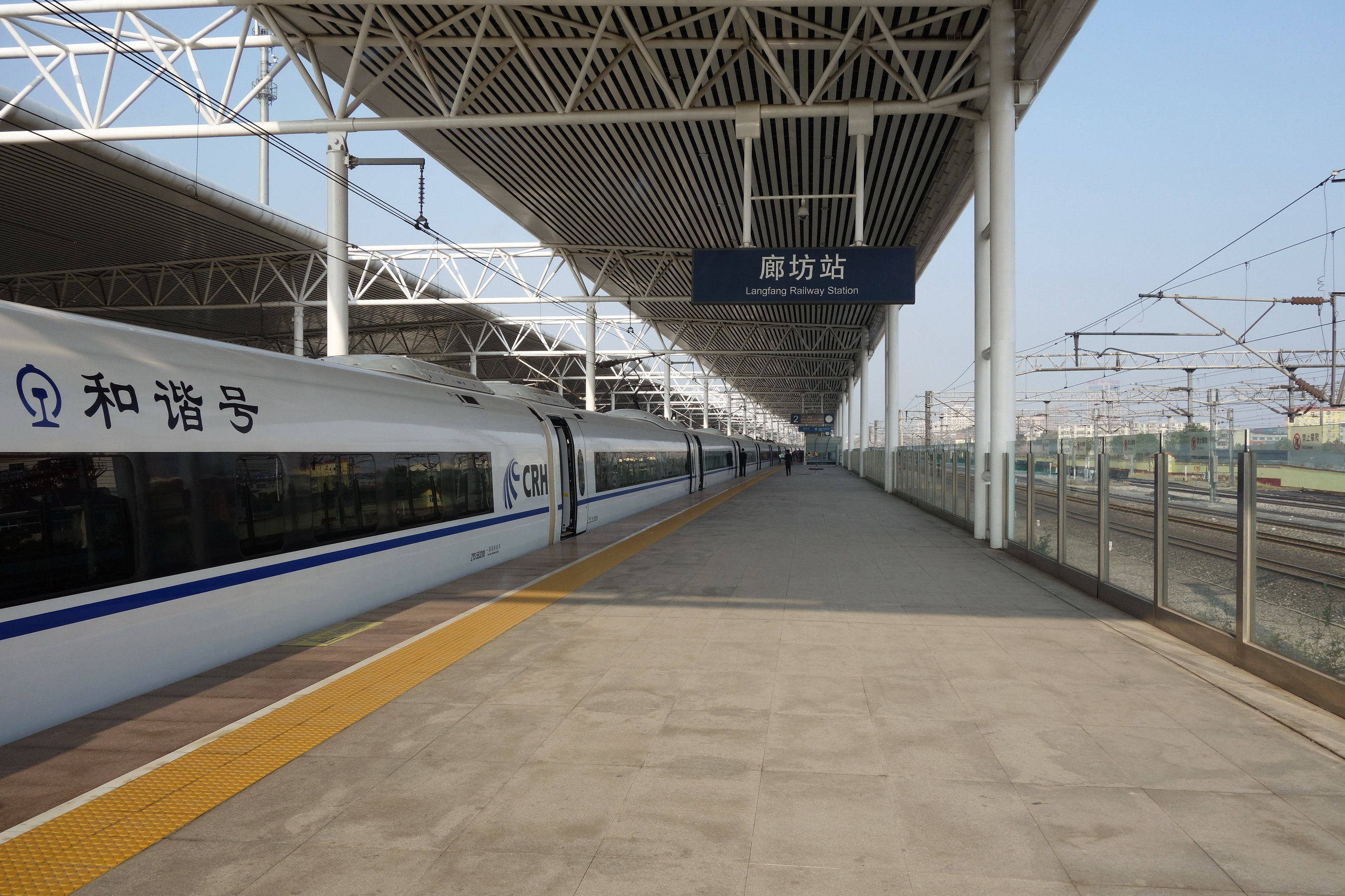 京沪高铁廊坊站站台